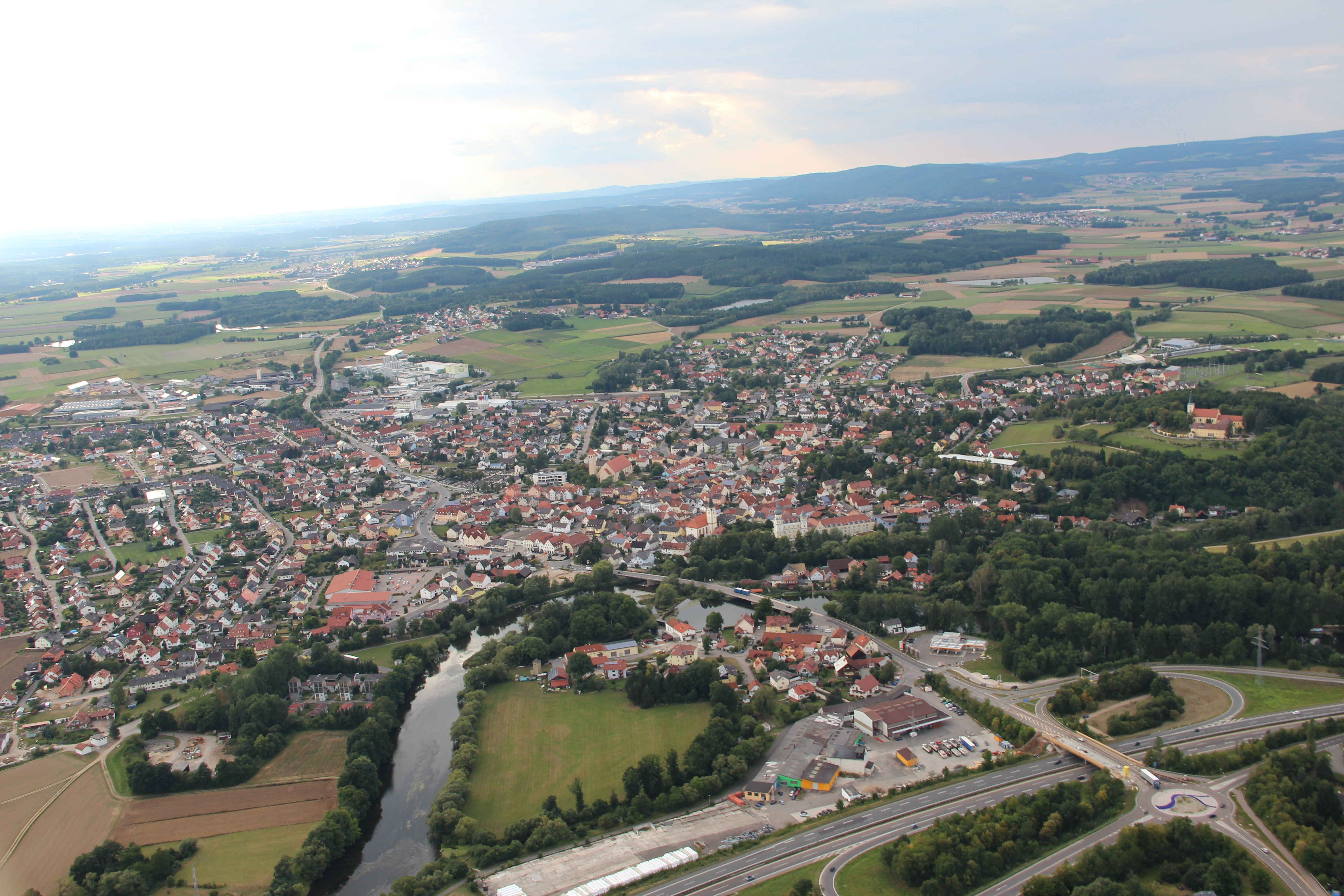 Schwarzenfeld, Landkreis Schwandorf, Oberpfalz, Bayern (2012)